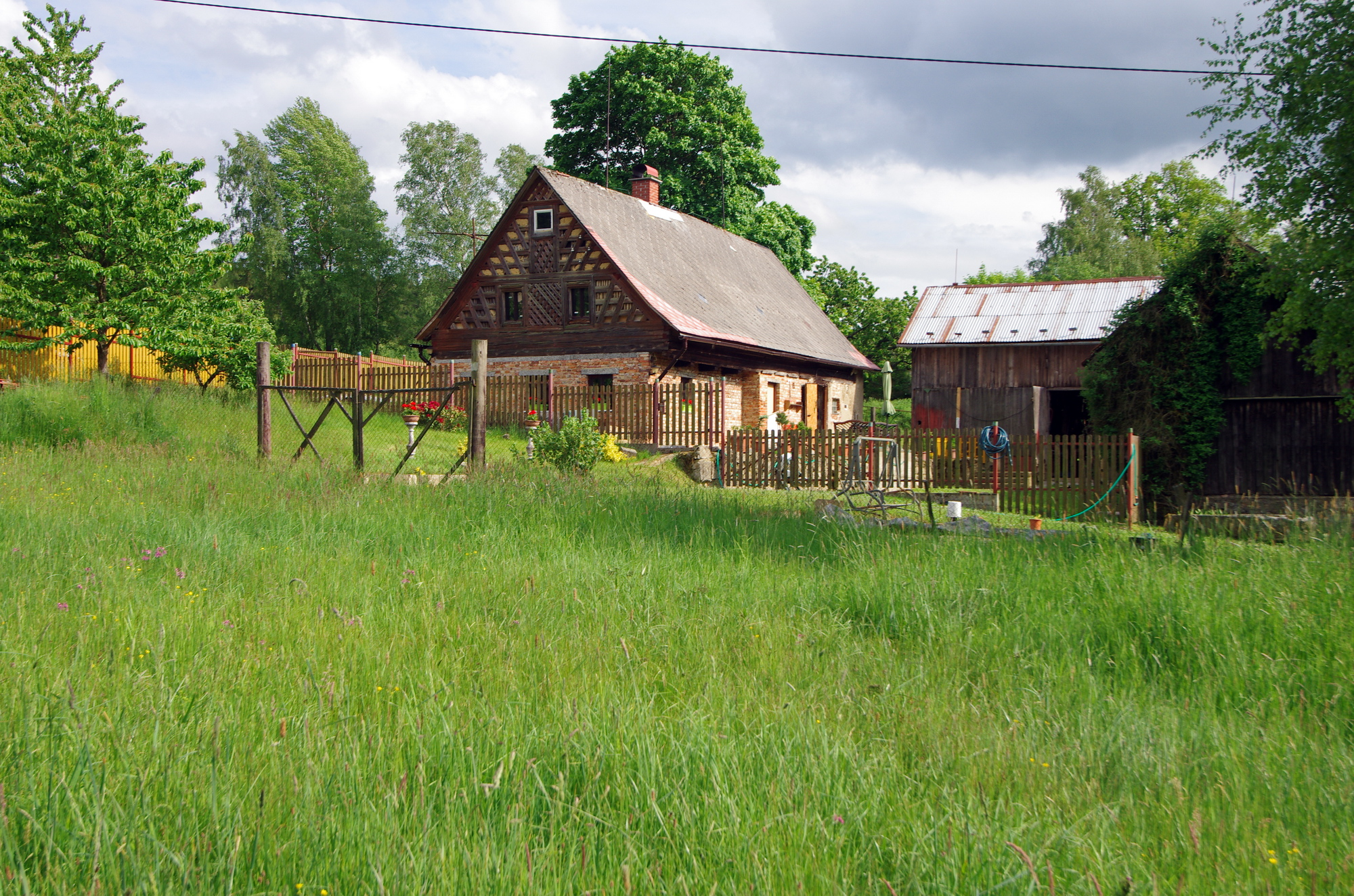 Těšovská hájovna nad Těšovem u Milíkova, Slavkovský les, okres Cheb